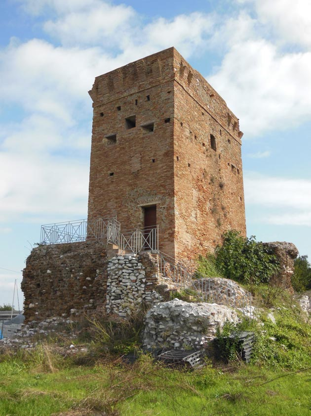 Tor Boacciana Roma (al confine con il comune di Fiumicino), presso il ponte della Scafa